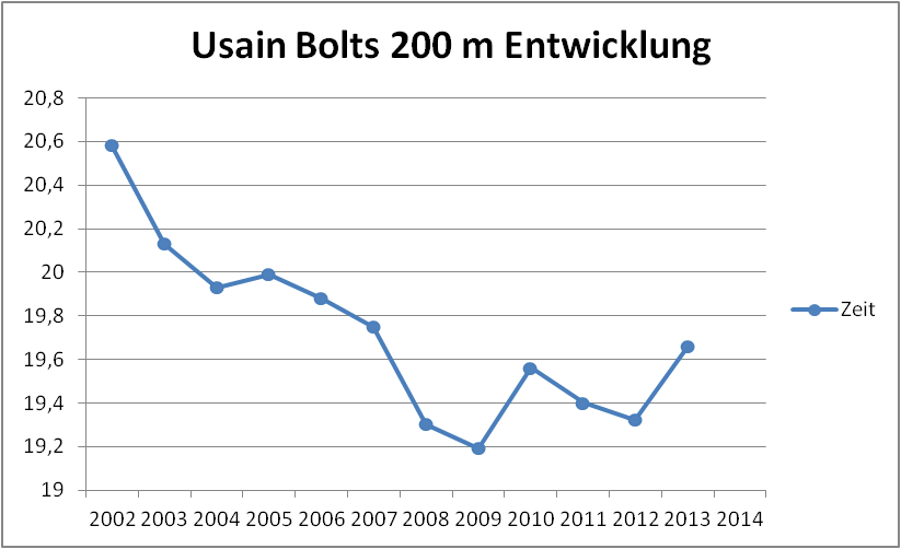 Entwicklung der Saisonbestleistungen von Usain Bolt